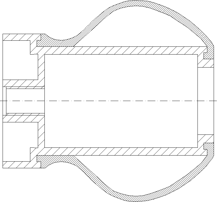 Projekt formy składanej do wykonania dzbanka